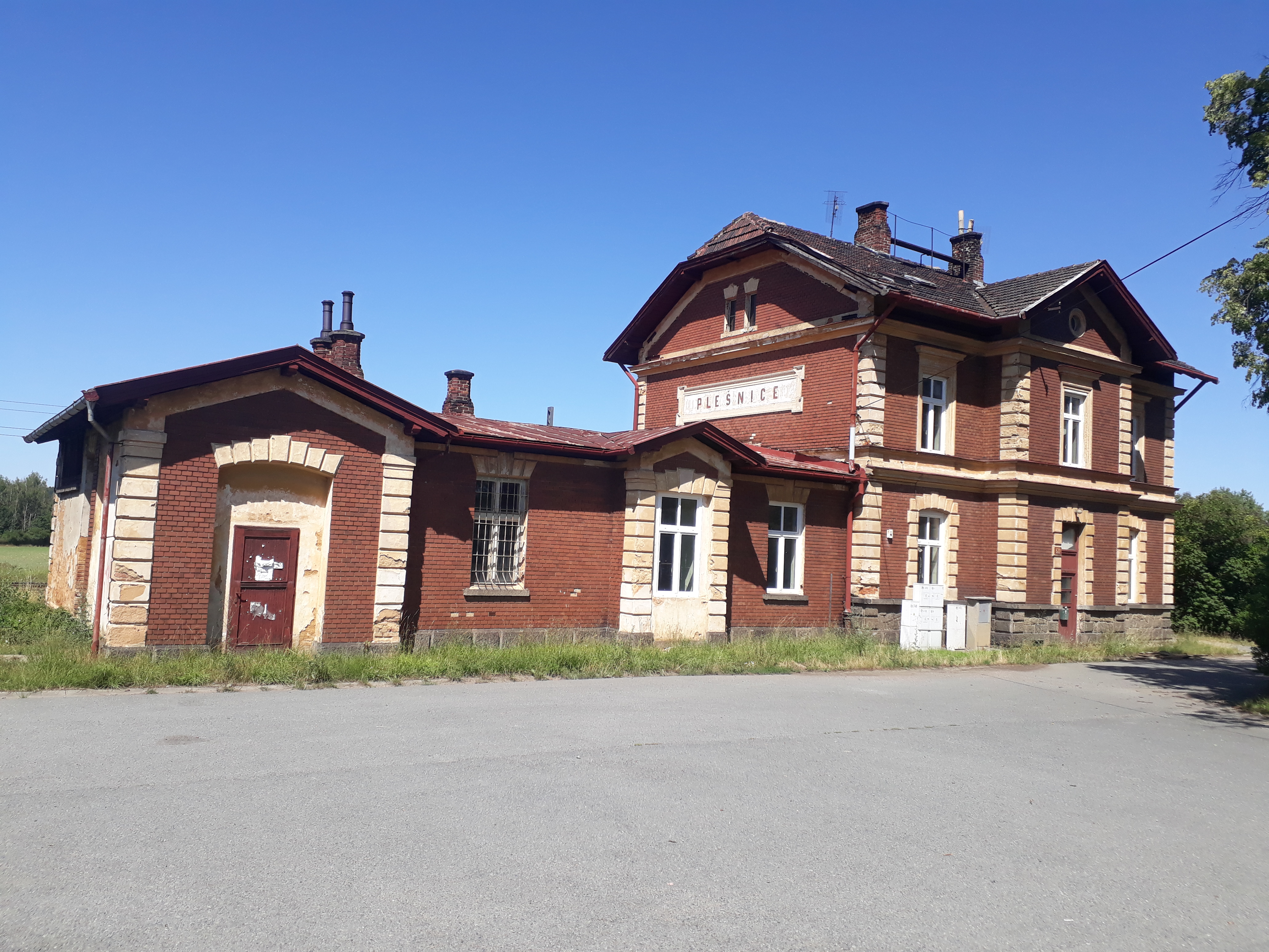 Žel. nádraží Plešnice - pohled z ulice